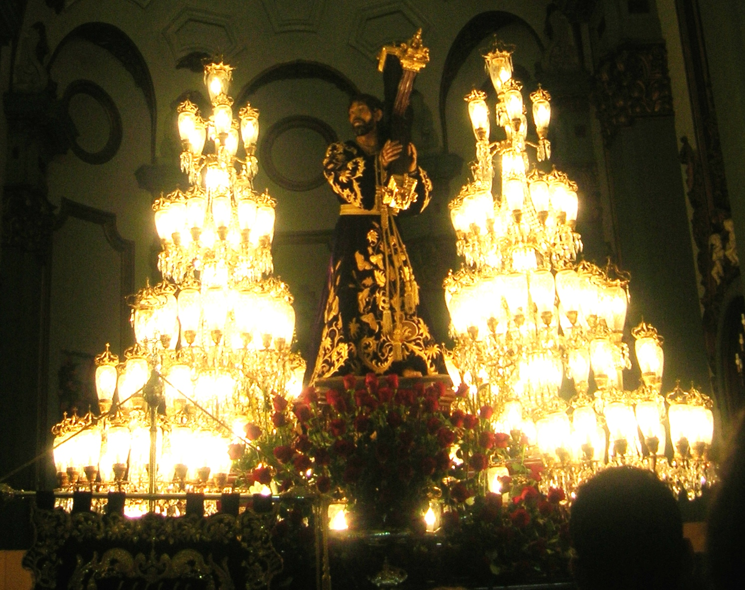 Jesús Nazareno (Marrajos)